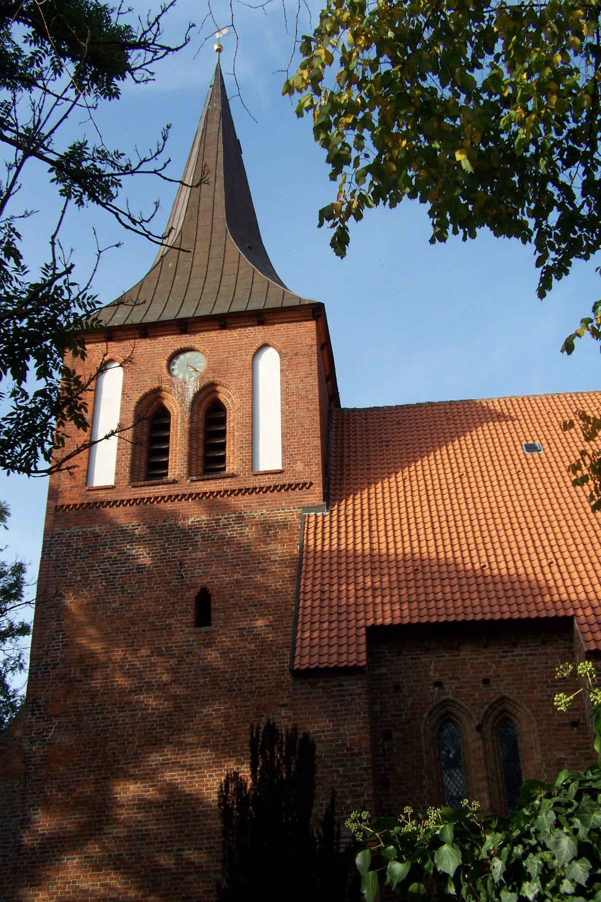 Lüdershagen, Georgskirche, Turm (2008-09-28)